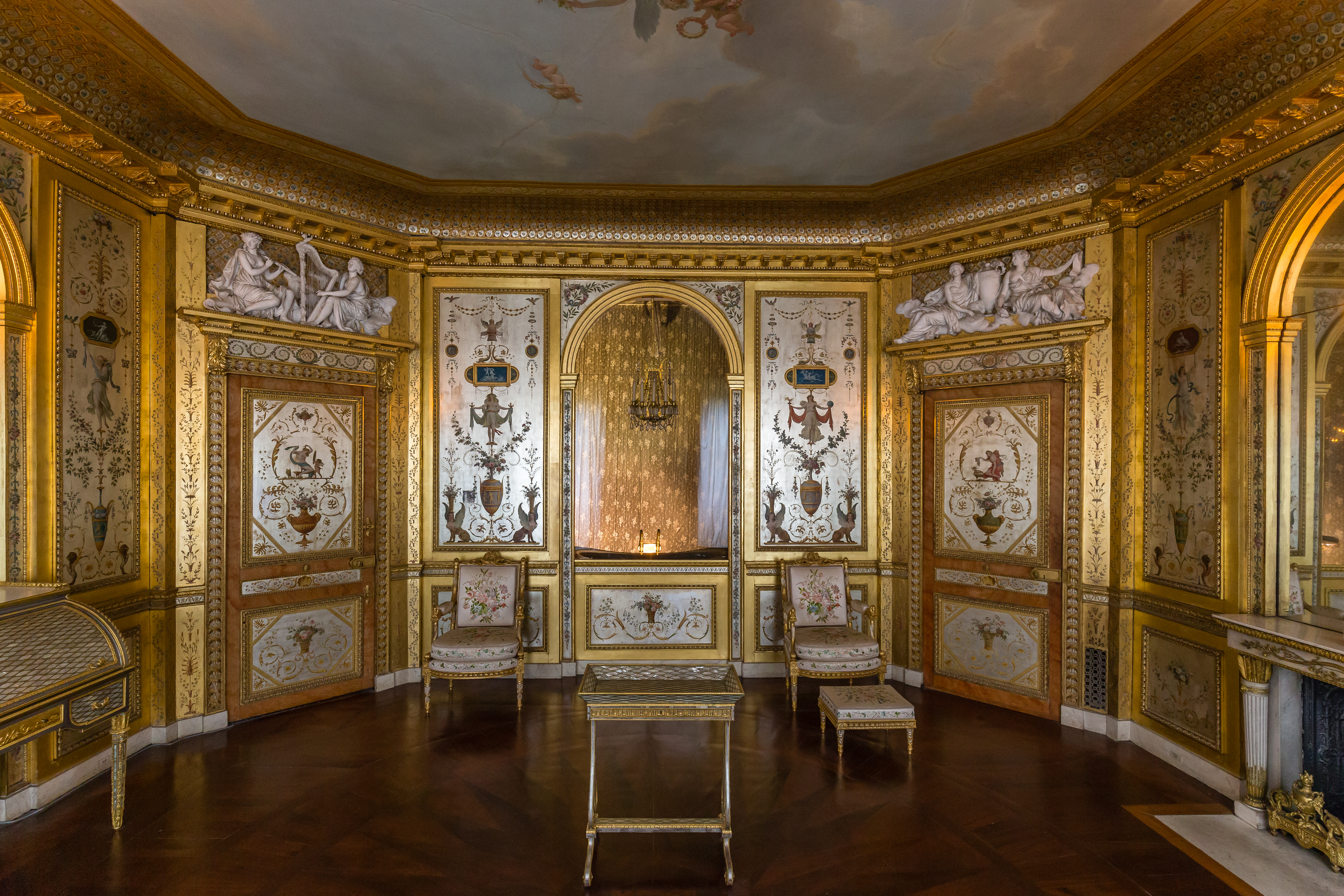 Boudoir de la reine, Château de Fontainebleau